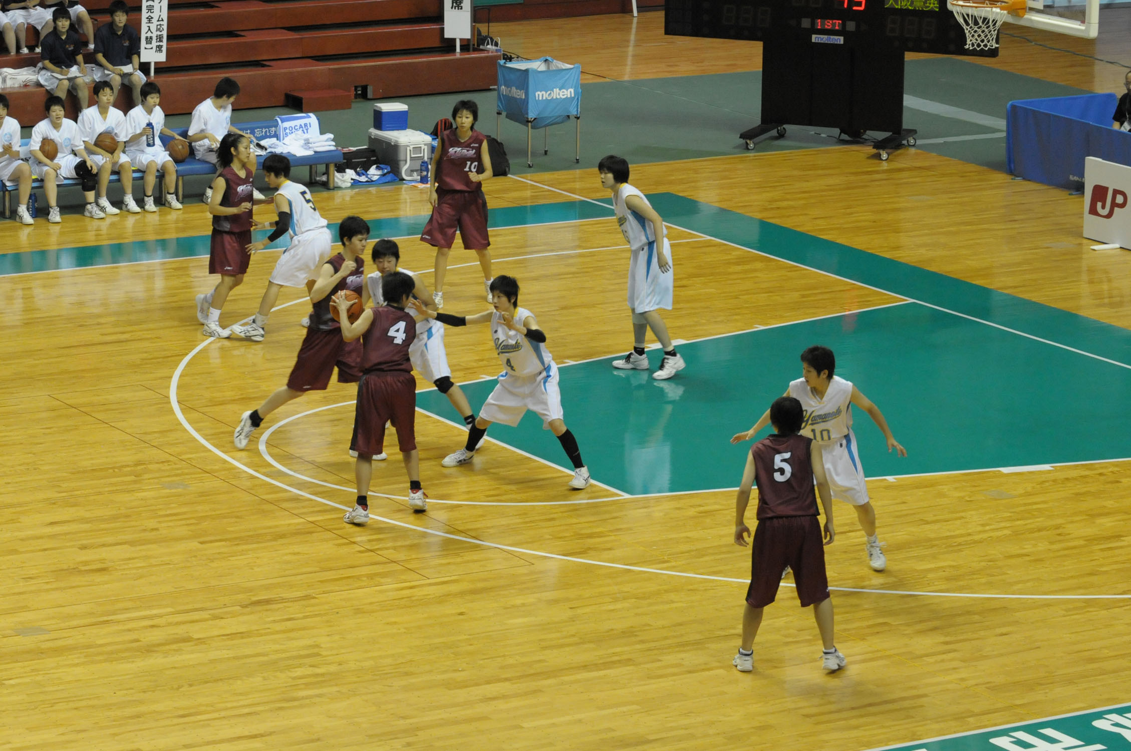 札幌山の手高対大阪薫英女学院。秋田市立体育館で。